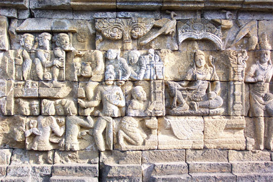 אחד מהתבליטים במקדש.